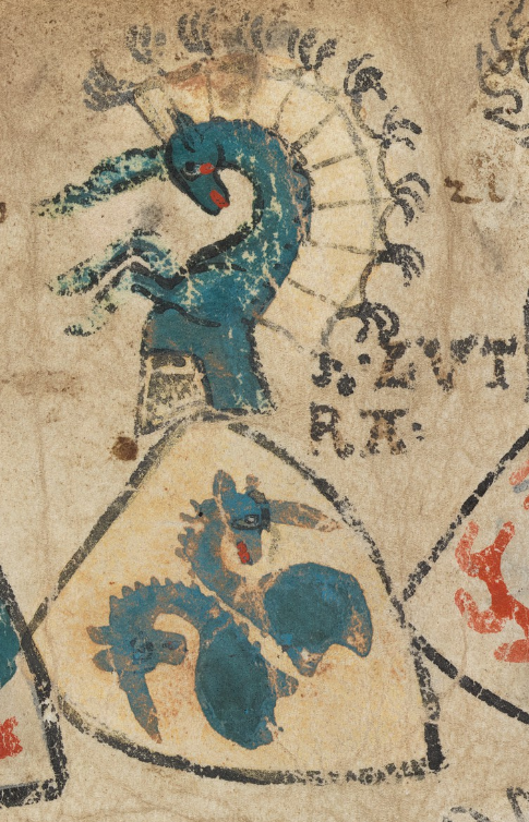 trewtewrt